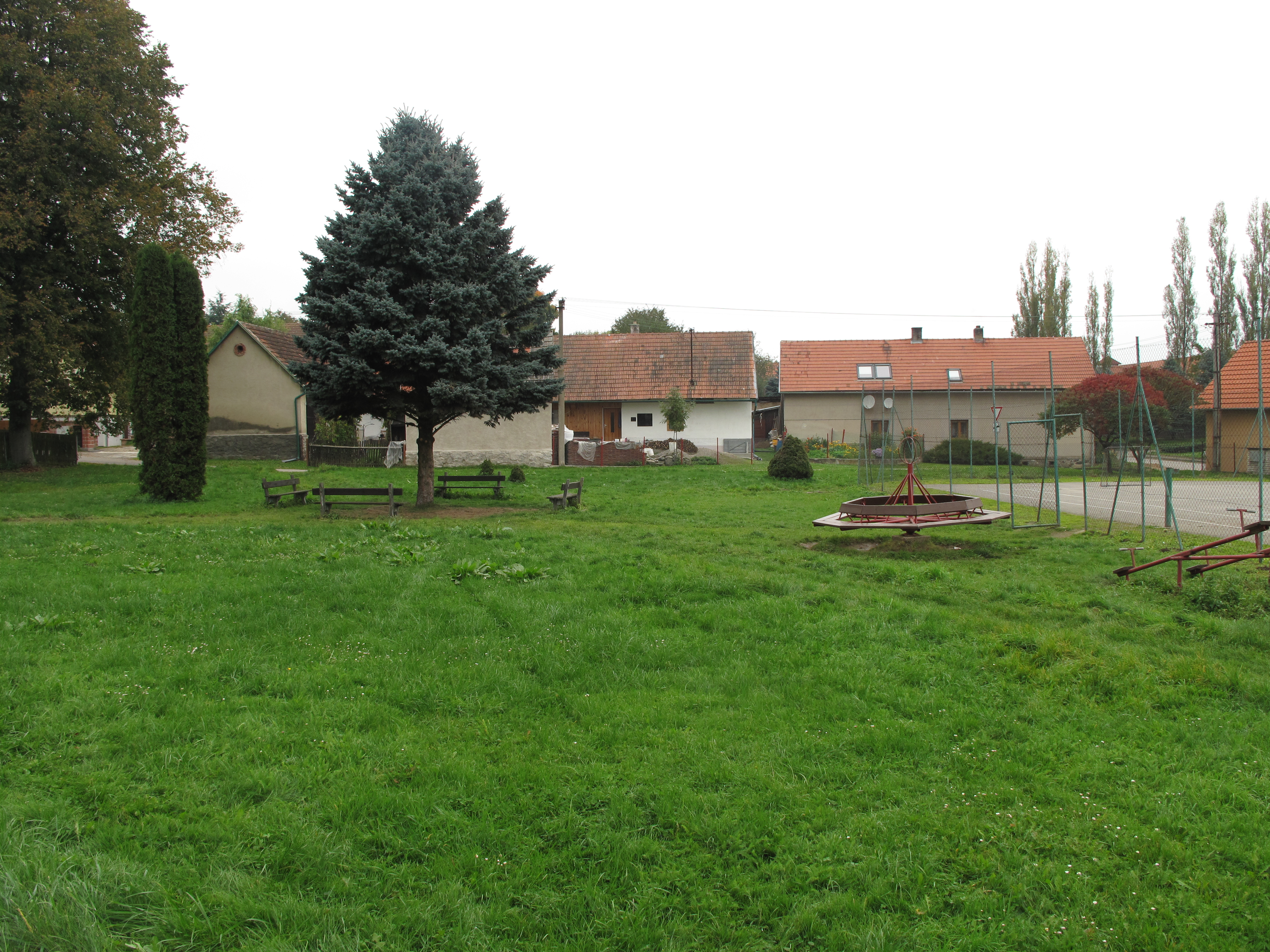 Hřiště v Pičíně. Okres Benešov, Česká republika.